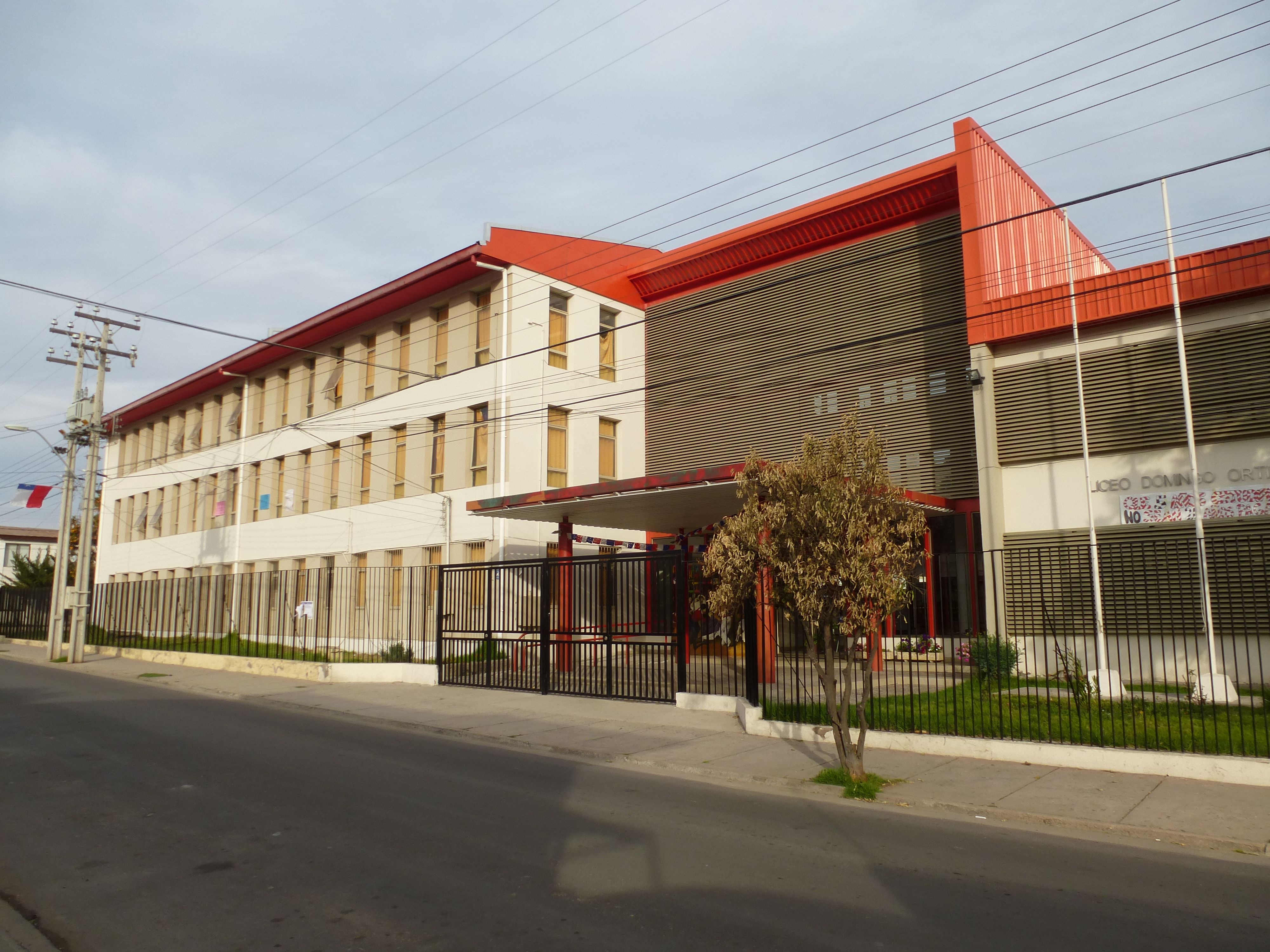 Liceo Domingo Ortiz de Rosas (B-15), de enseñanza científico-humanista, ubicado en la ciudad de Illapel.